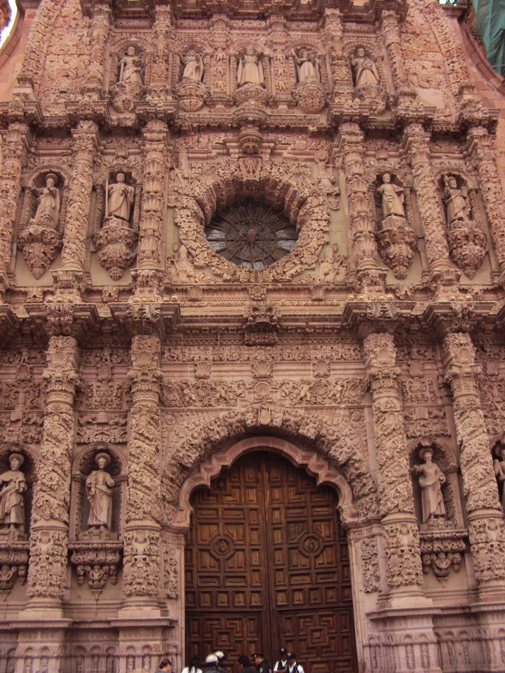 Fachada principal de la Catedral Basílica de Zacatecas